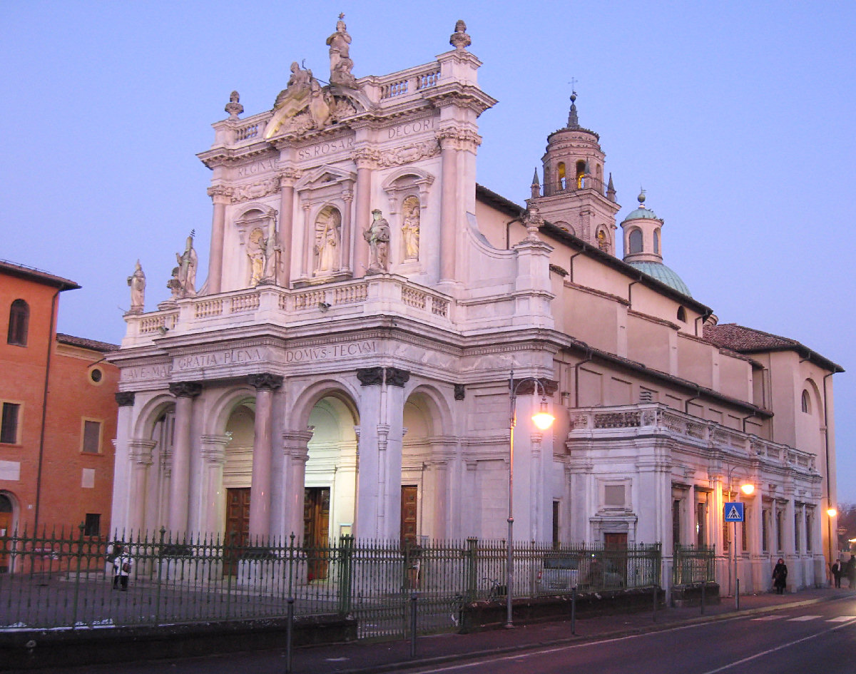 Santuario della Beata Vergine del santo Rosario (Fontanellato, PR, Italy)